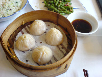 皮有點厚 裡頭的餡和湯汁還不錯?~